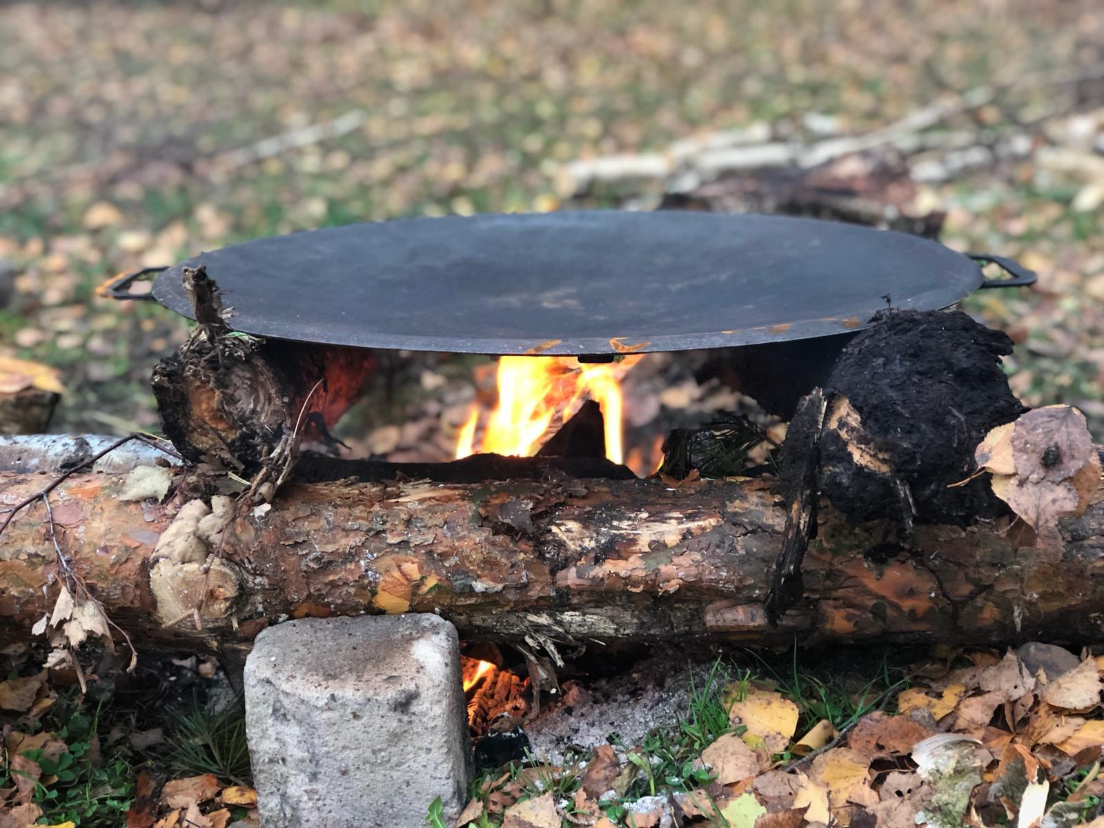 Klasiskā Muurikka panna ar universālu pielietojumu dažādu ēdienu gatavošanai virs gāzes, elektriskajiem griliem vai atklātas uguns. Nedaudz Izliektais pannas dizains cepšanas laikā uztur ēdienu sulīgāku. Ar Muurikka panna jūs varat pagatavot uzkodas, pamatēdienus, gan arī desertus. Pie pareizas apkopes šo pannu iespējams lietot mūžu.